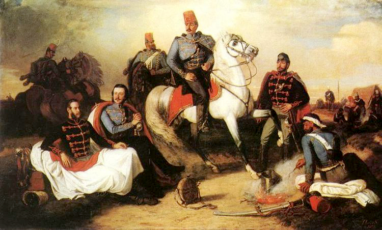 A kép közepén gróf Bethlen József, fehér lovon. Tőle balra gróf Esterházy István és báró Podmaniczky Frigyes ül, előbbi a kardját fogja, utóbbi szivarozik. Bethlen József lova mögött Almásy Dénes áll